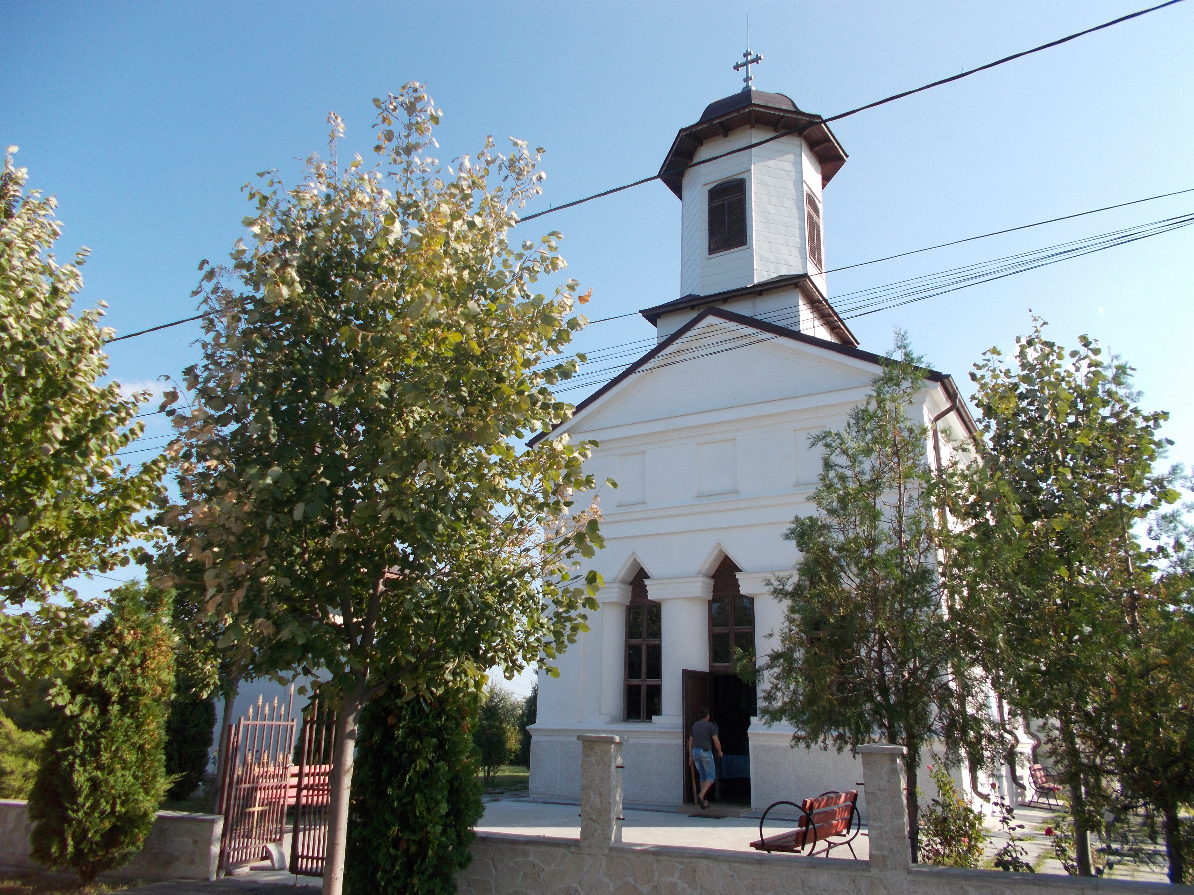 Biserica de zid ”Sf. Gheorghe” din satul Ograda, județul Ialomița